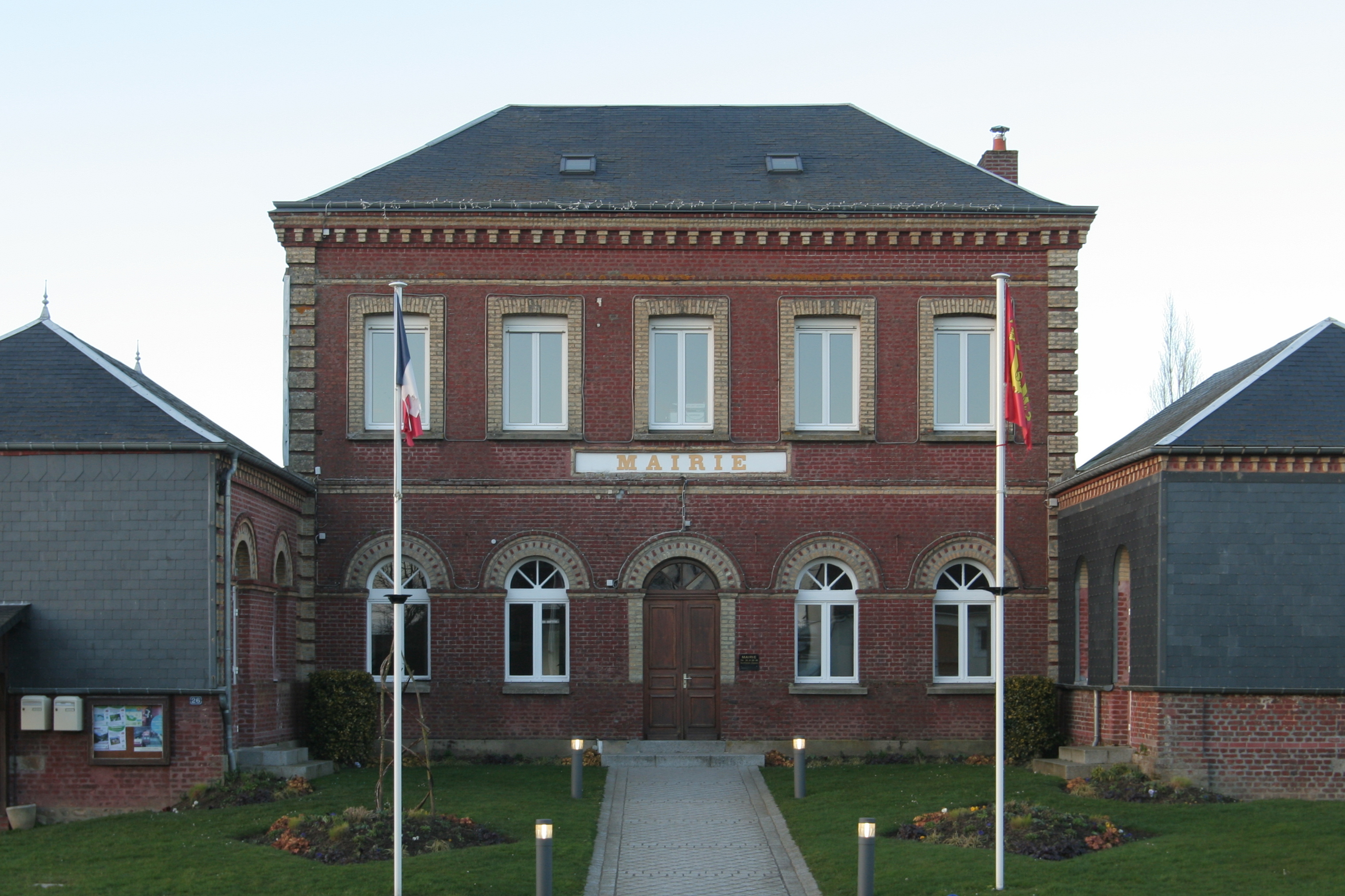 Mairie des Trois-Pierres.